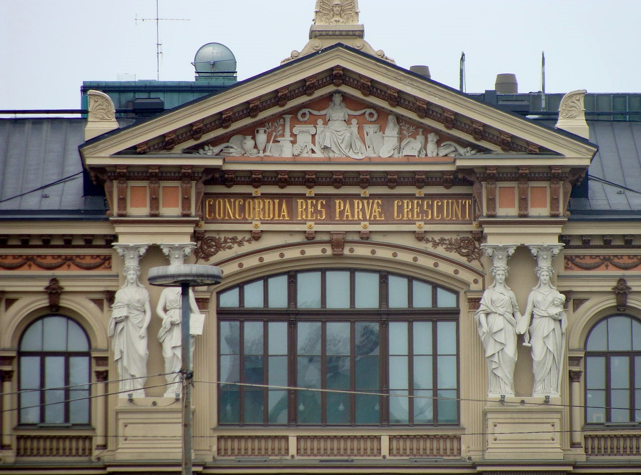 Patsaat Ateneumin katolla